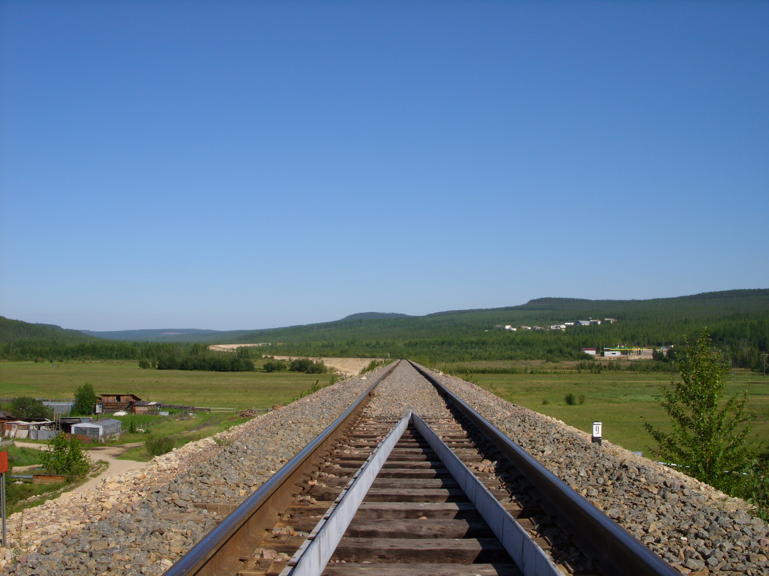 АЯМ в окрестностях Томмота, после ЖД моста через Алдан. Путь уходит на север, на Якутск.